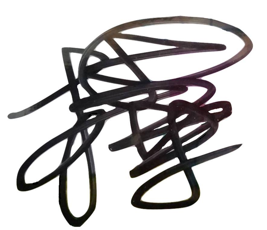 2015年陳嘉樺中文簽名